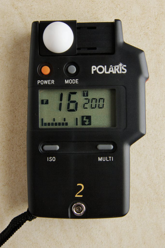 Descripción: Exposímetro digital (modo: medición flash) Fecha: 18/07/2006 Hora: 19:04 Cámara: EOS 30D ISO: 100 Tv: 1/250 Av: 22 Autor: aTarom